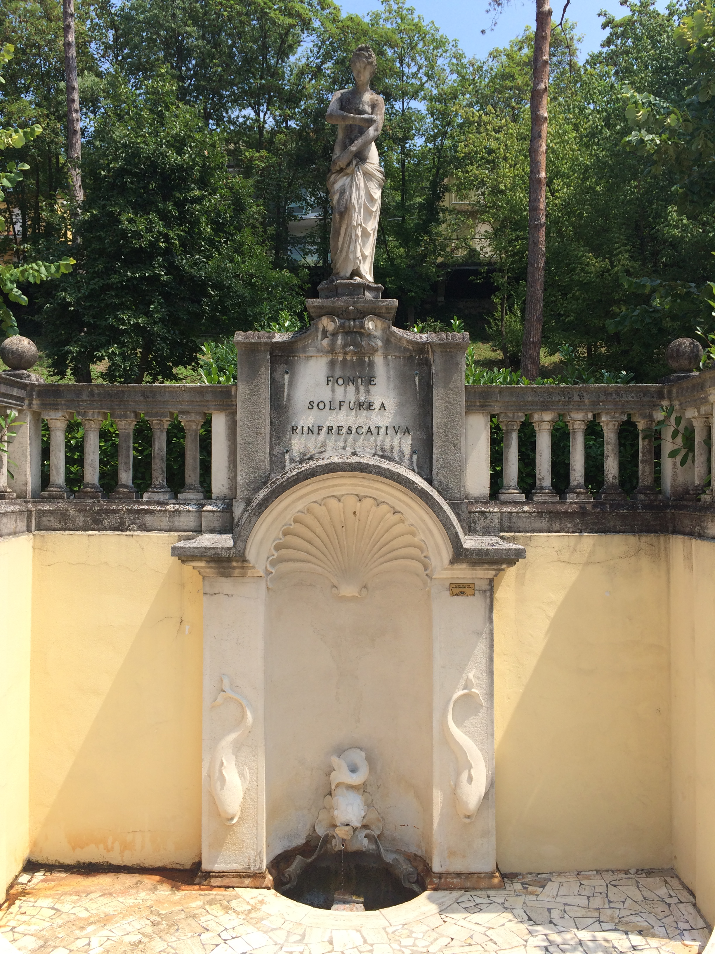 Die einzige der vorderen vier Quellen, die auch im Sommer 2016 funktionierte